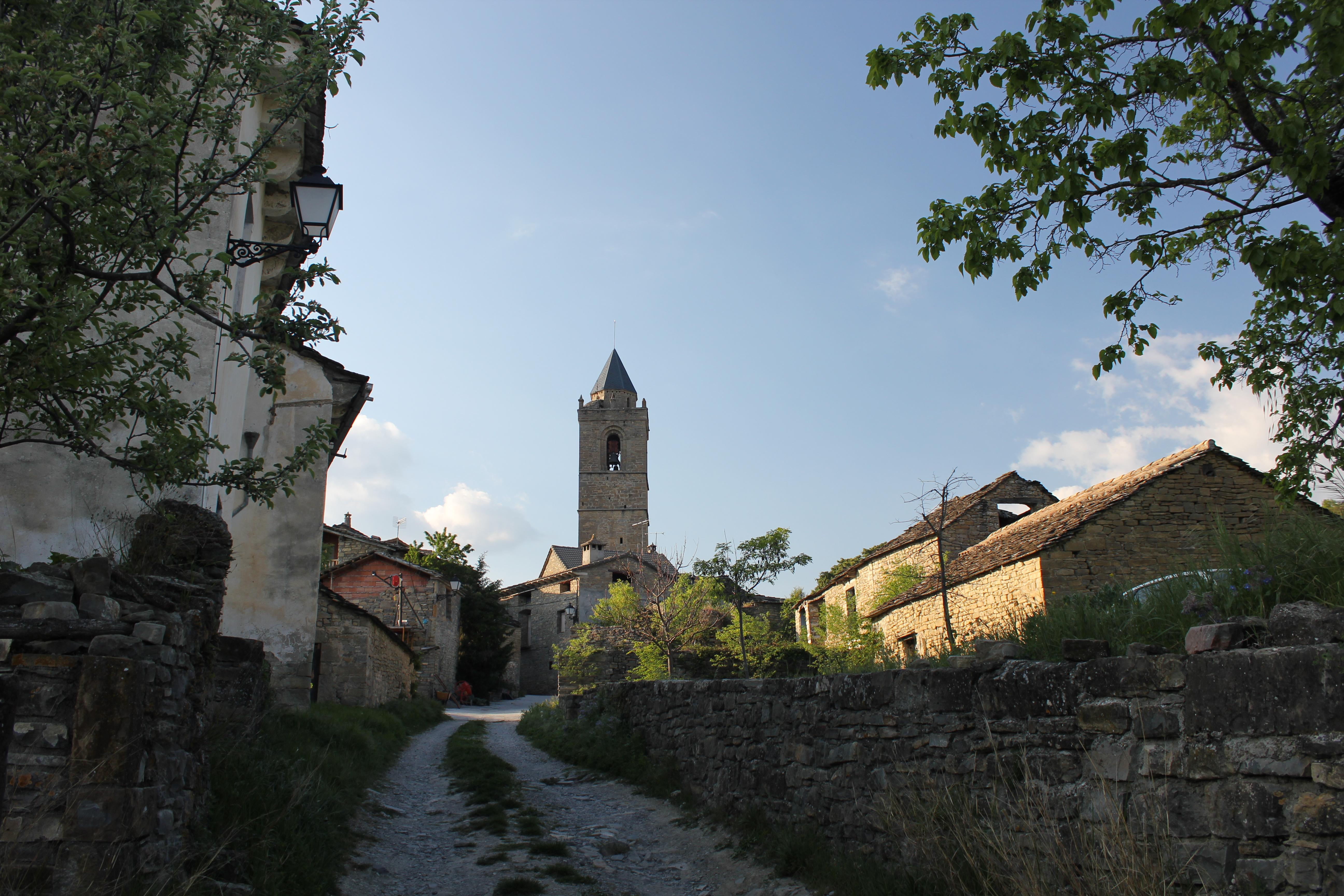 Aragonés: Cosculluela de Sobrarbe